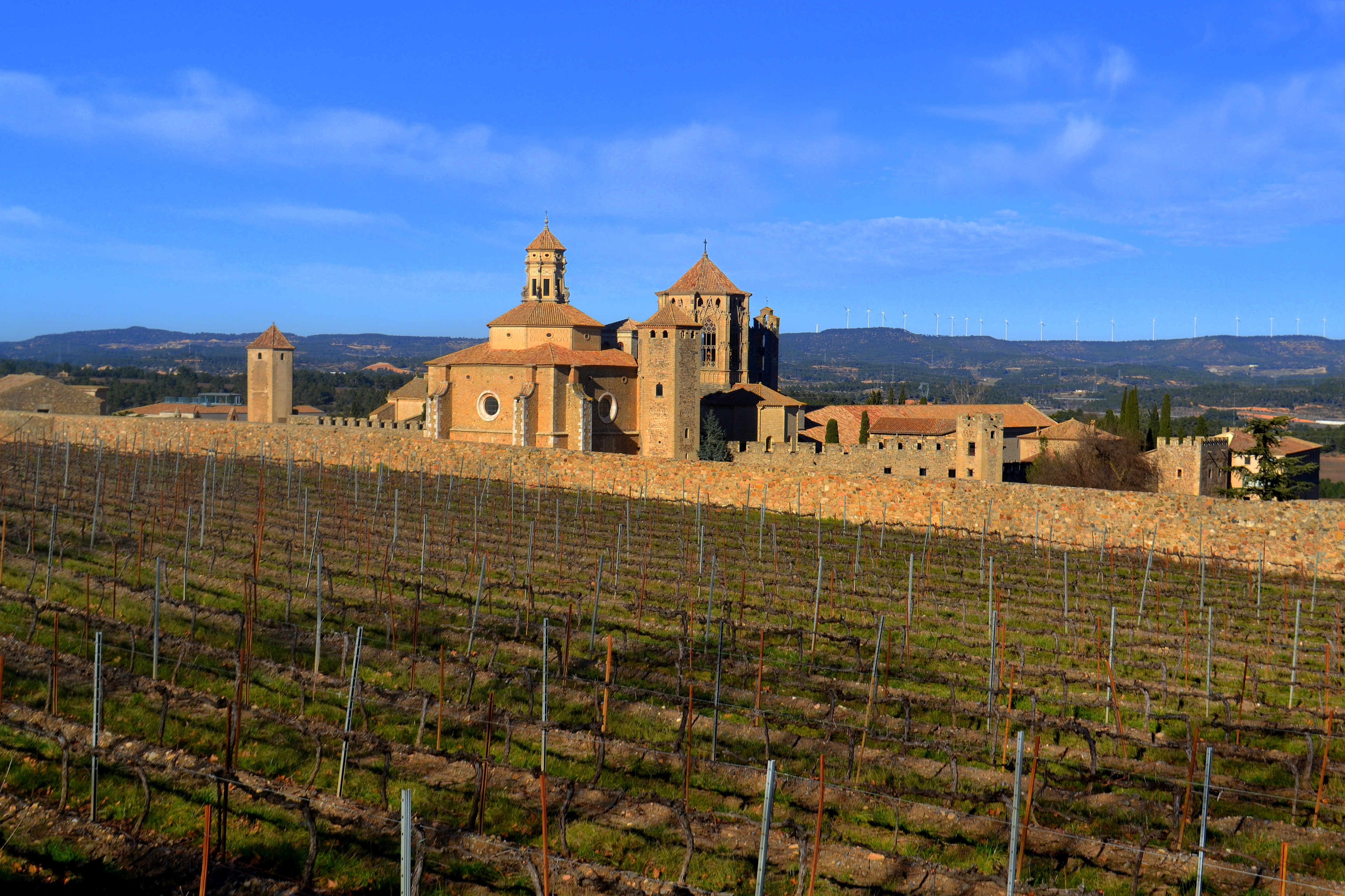 Monestir de Santa Maria de Poblet (Vimbodí i Poblet)